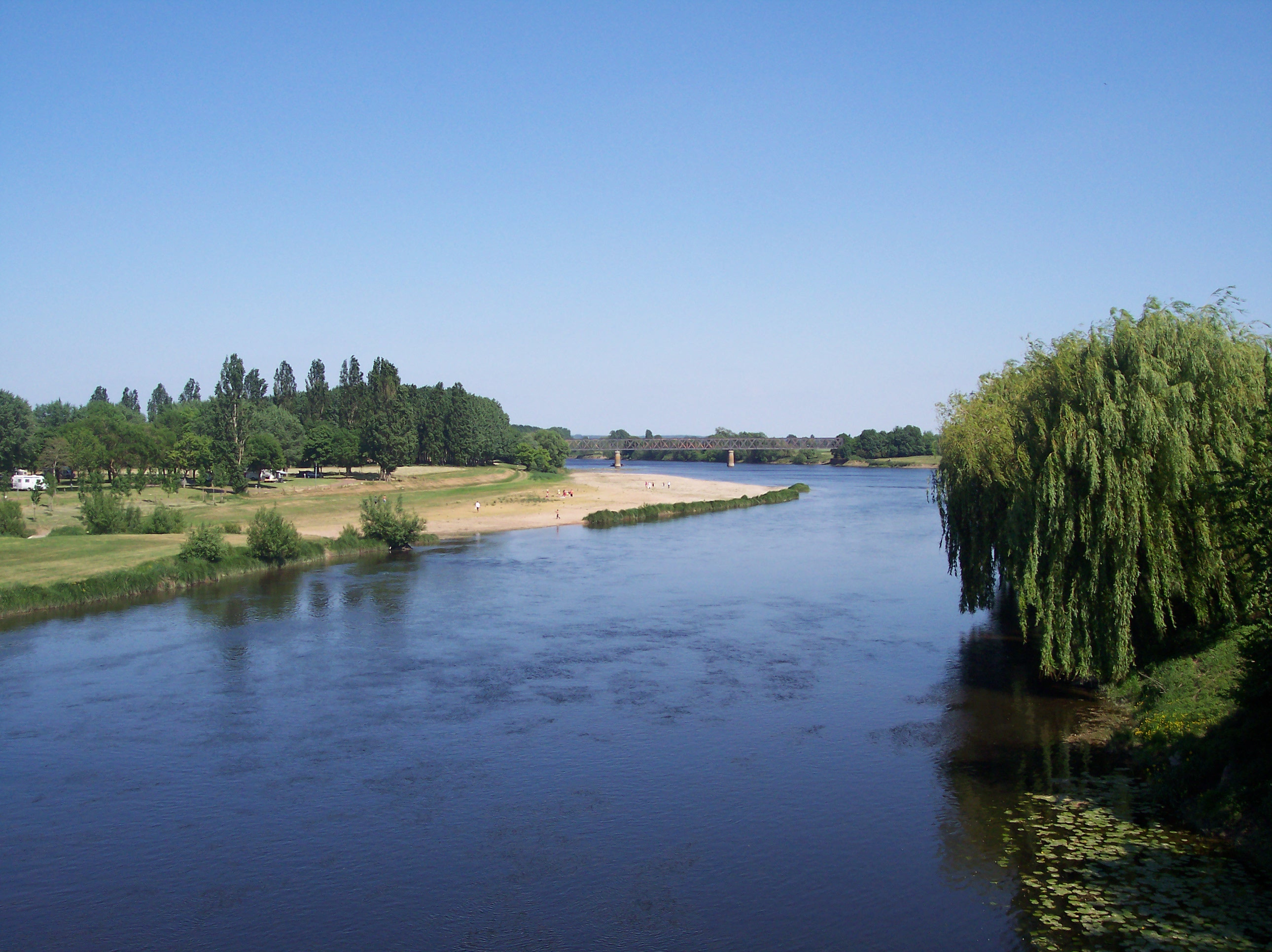 Vue sur la Vienne à L'Île-Bouchard